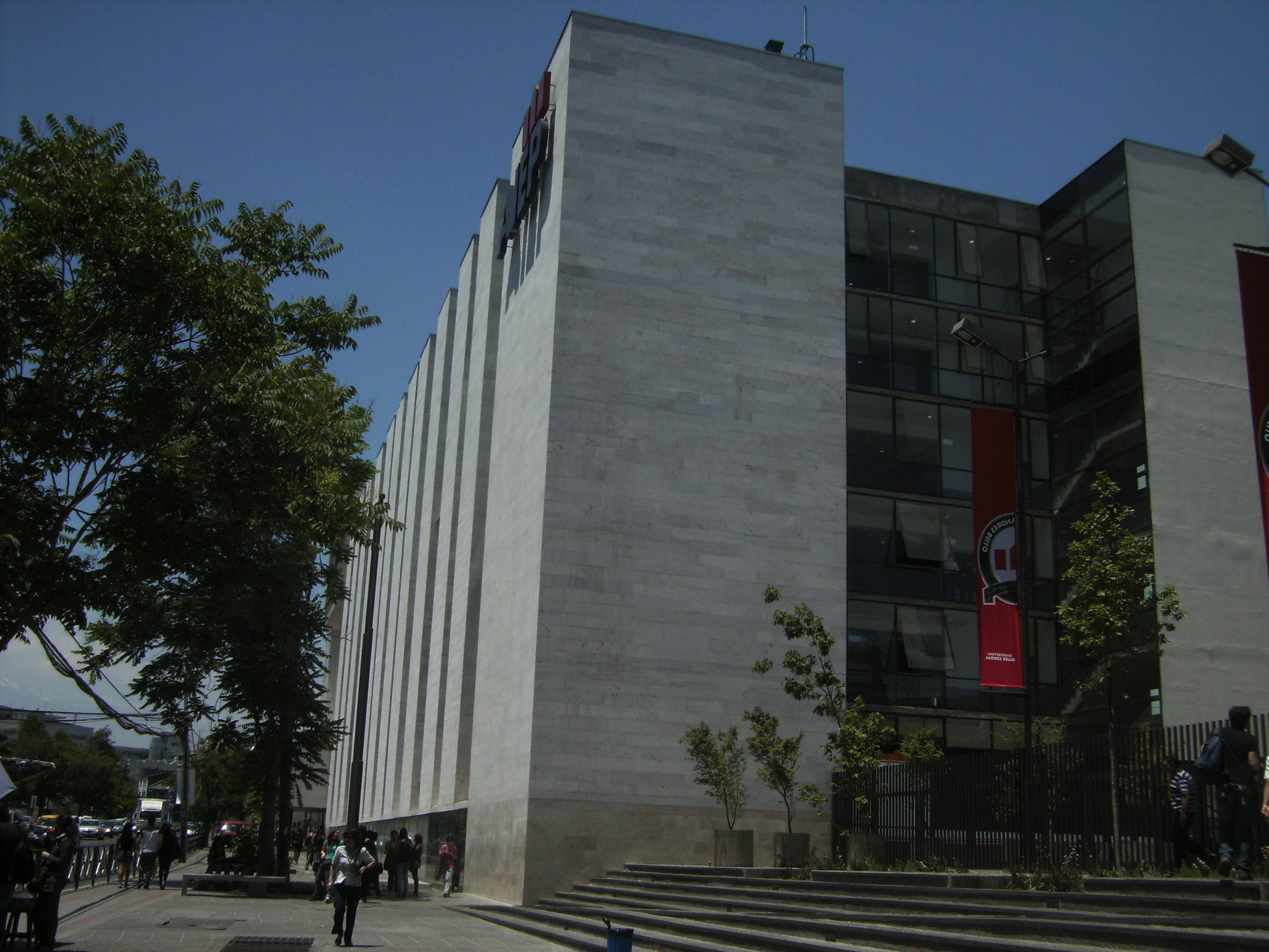 Edificio de Instituto Aiep Bellavista